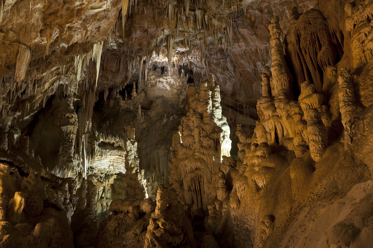 Grotta delle Torri di Slivia-Sala delle Torri